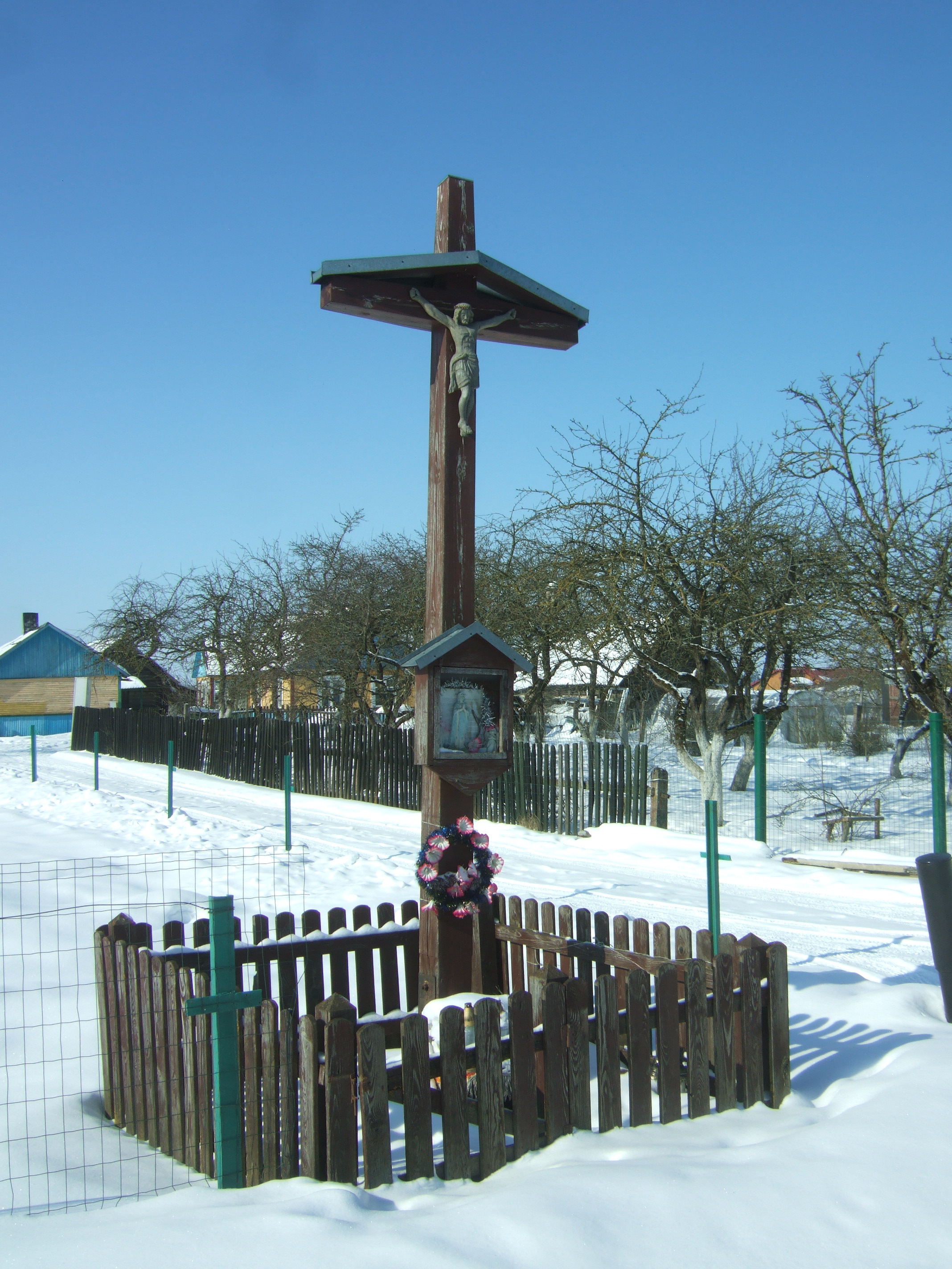 Kryžius Šventininkų kaime (Trakų raj.)